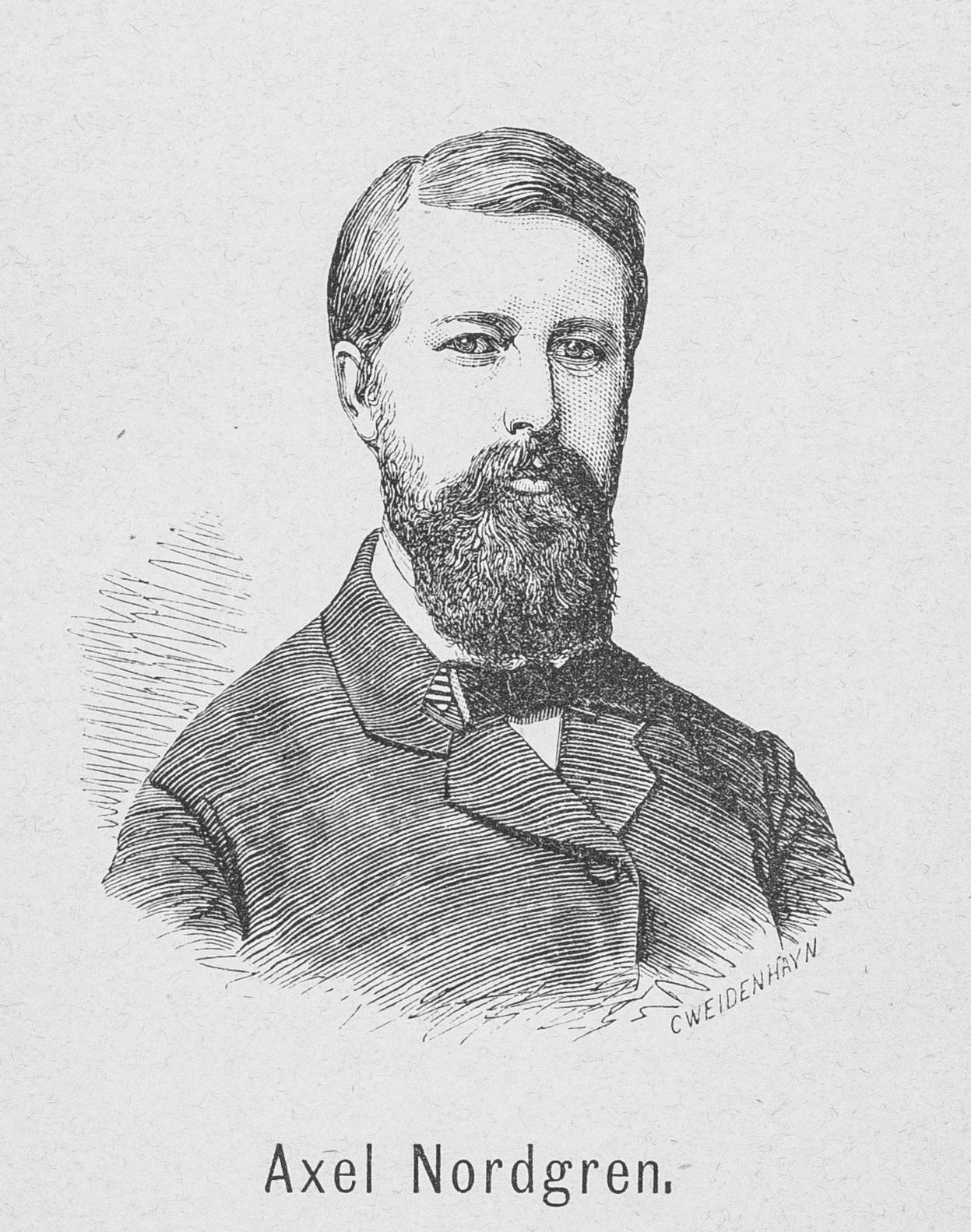 Porträtt av Axel Wilhelm Nordgren av Johanna Carolina Weidenhayn tryckt i Norden : national-kalender för år 1868 (